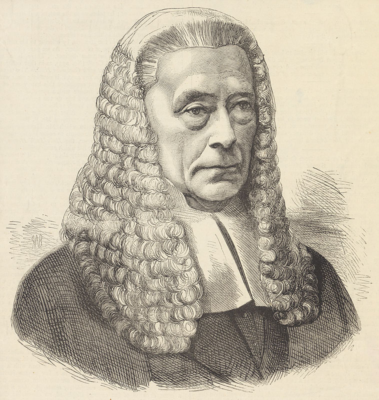 Sir George Hayes (1805-1869)